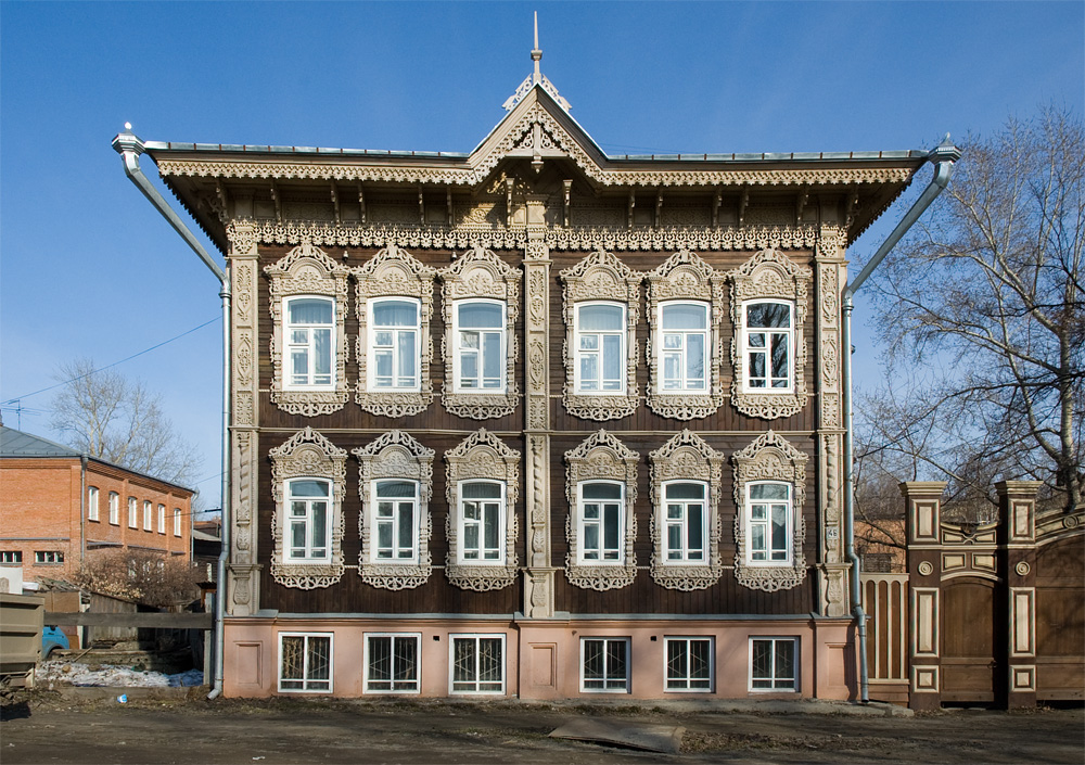 Дом жилой (деревянный) (Томская область, Томск, Татарская улица, 46)